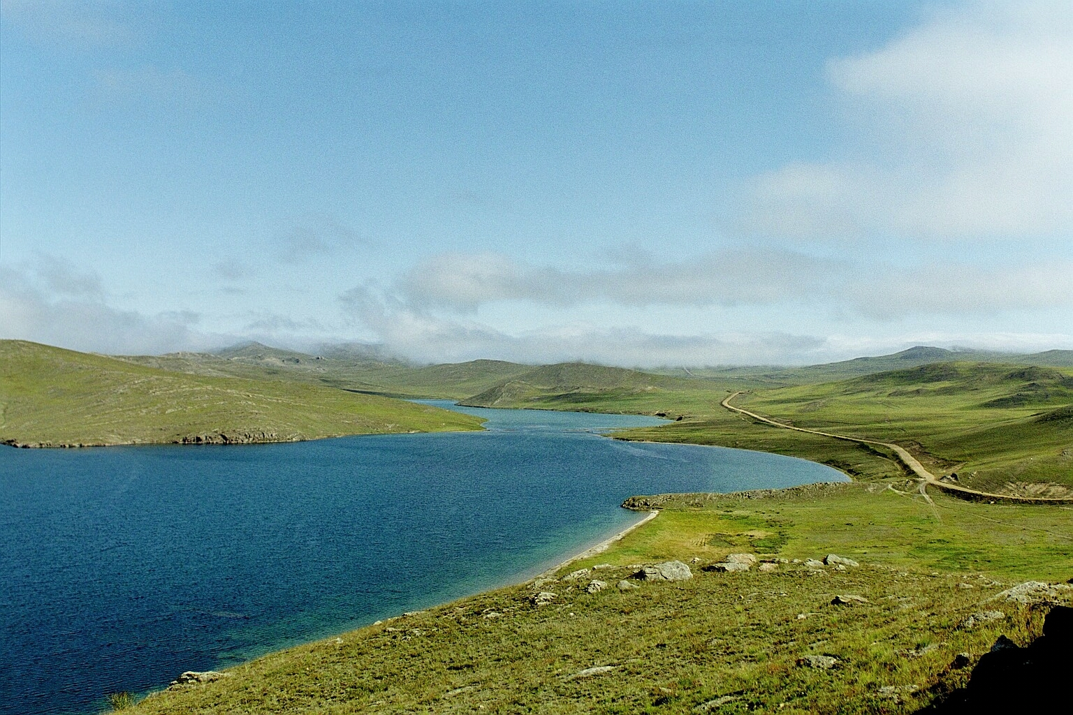 Baikalsee, Insel Olchon